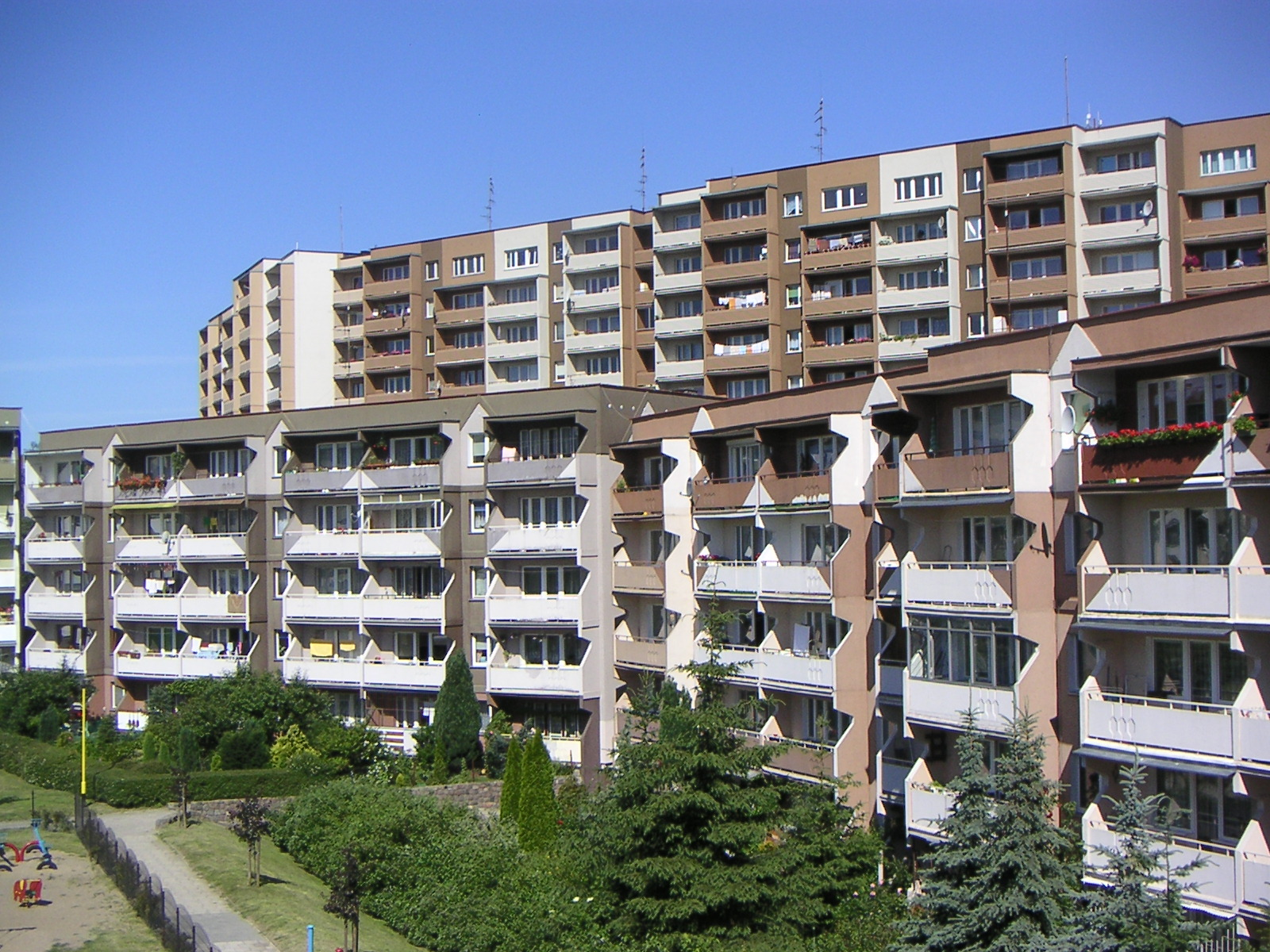 Szczecin-Bukowe, bloki mieszkalne przy ul. Brązowej, widok z południowego wschodu